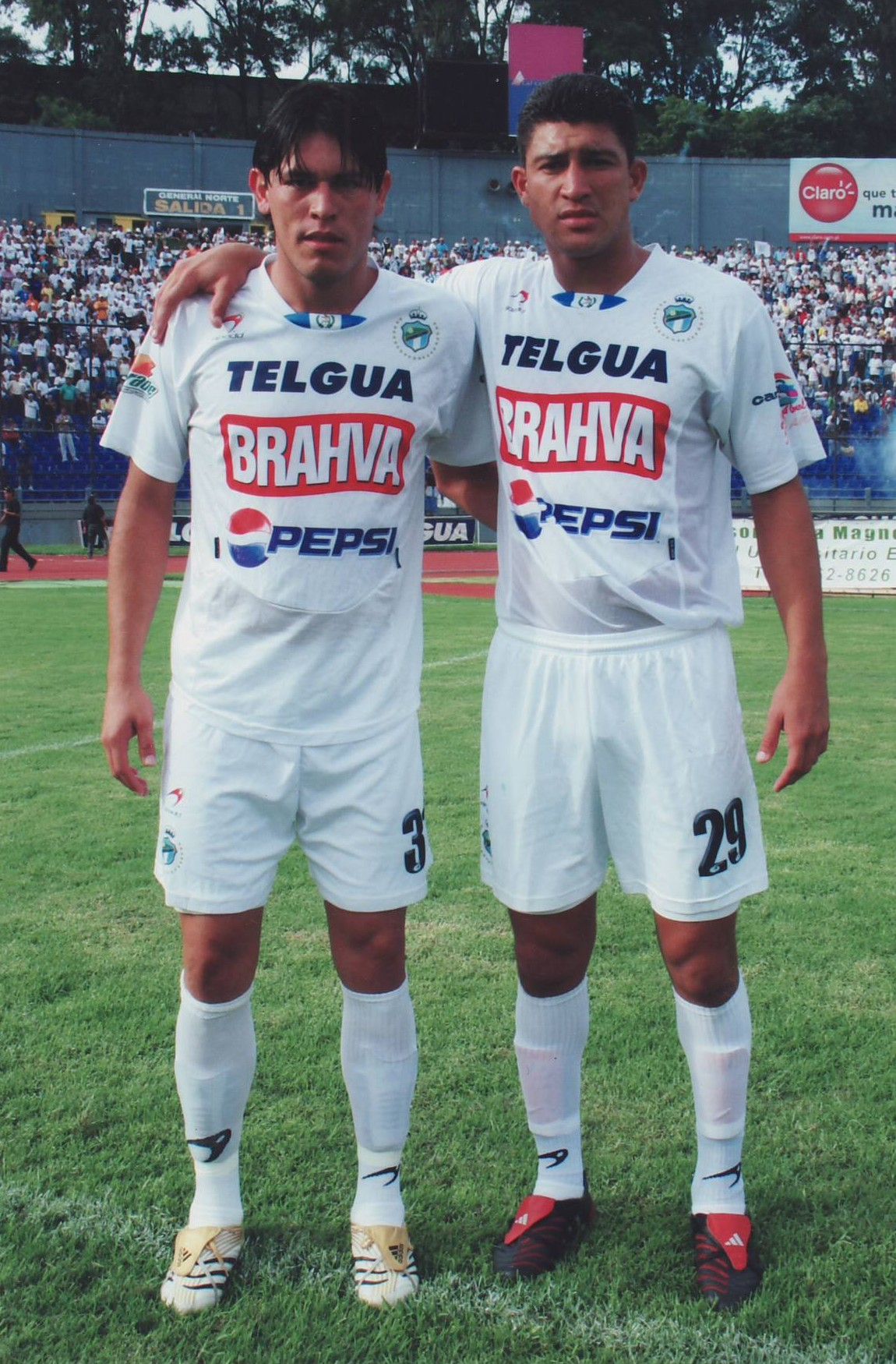 Juntos Paulo Centurion y Joel Benítez antes del super clasico n° 228 de la Liga Nacional de Fútbol de Guatemala